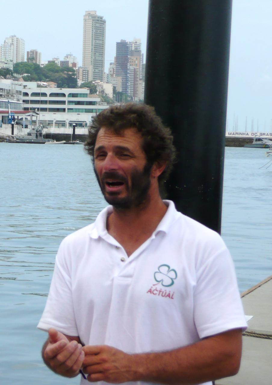 Yves Le Blevec, skipper spécialiste de la course au large